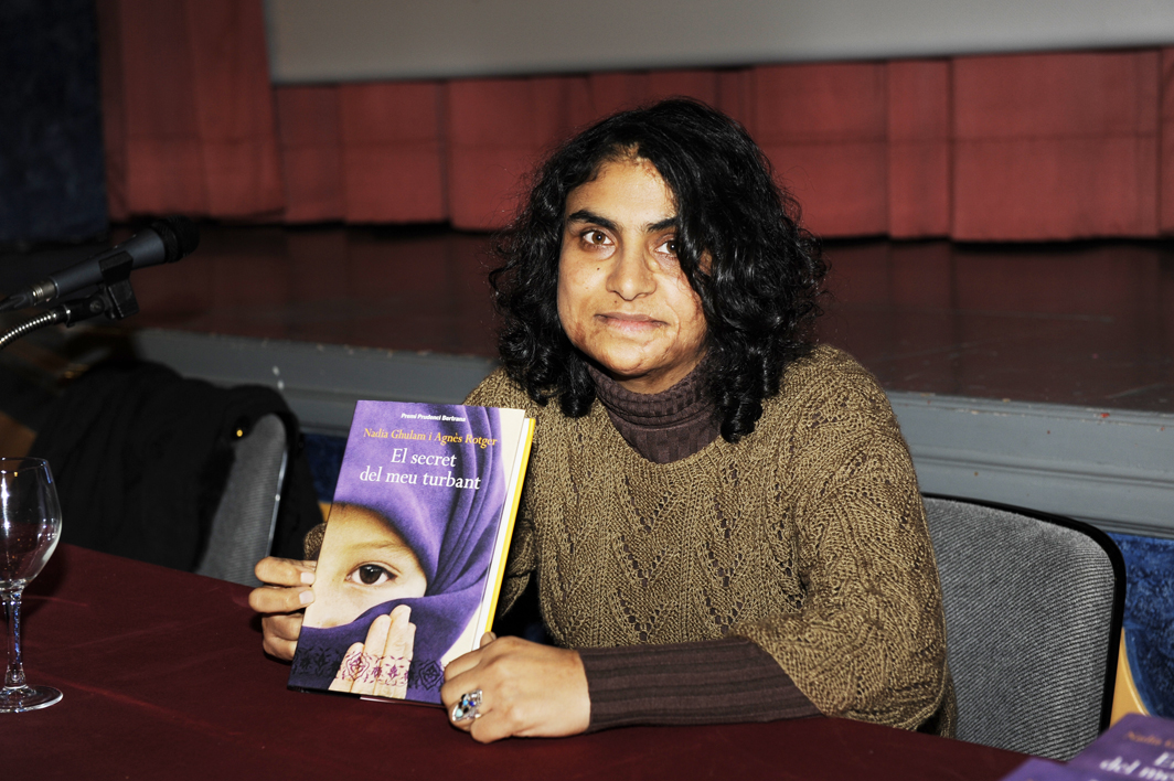 Nadia Ghulam 2012